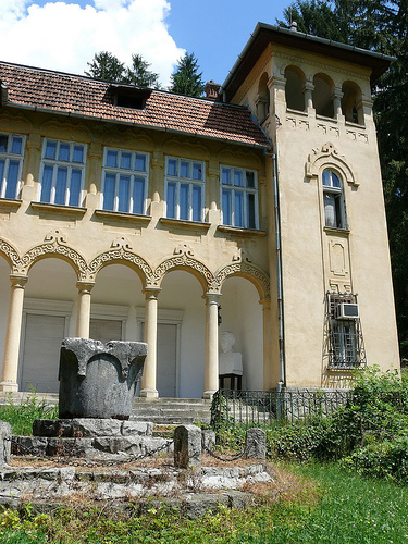 Ciucea_castle, Cluj county, Romania